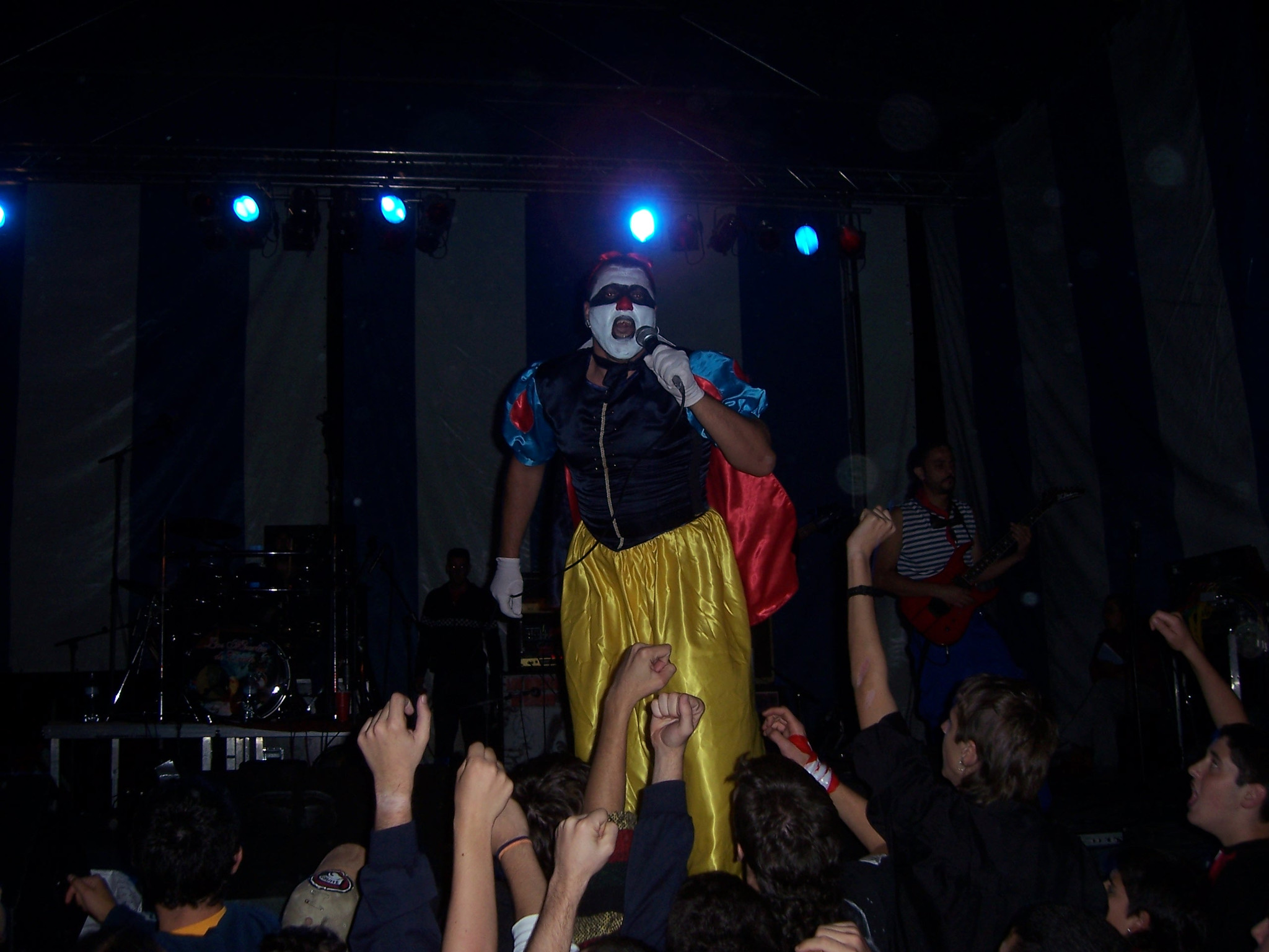 Lorenzo - Los Muertos de Cristo - Concierto en Haro (La Rioja)